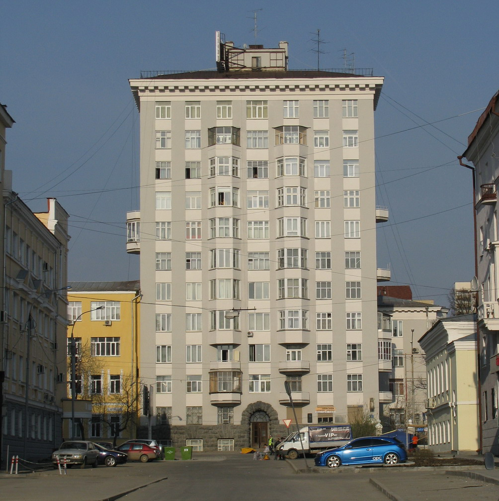 Дом, в котором жил Б.Н.Ельцин.